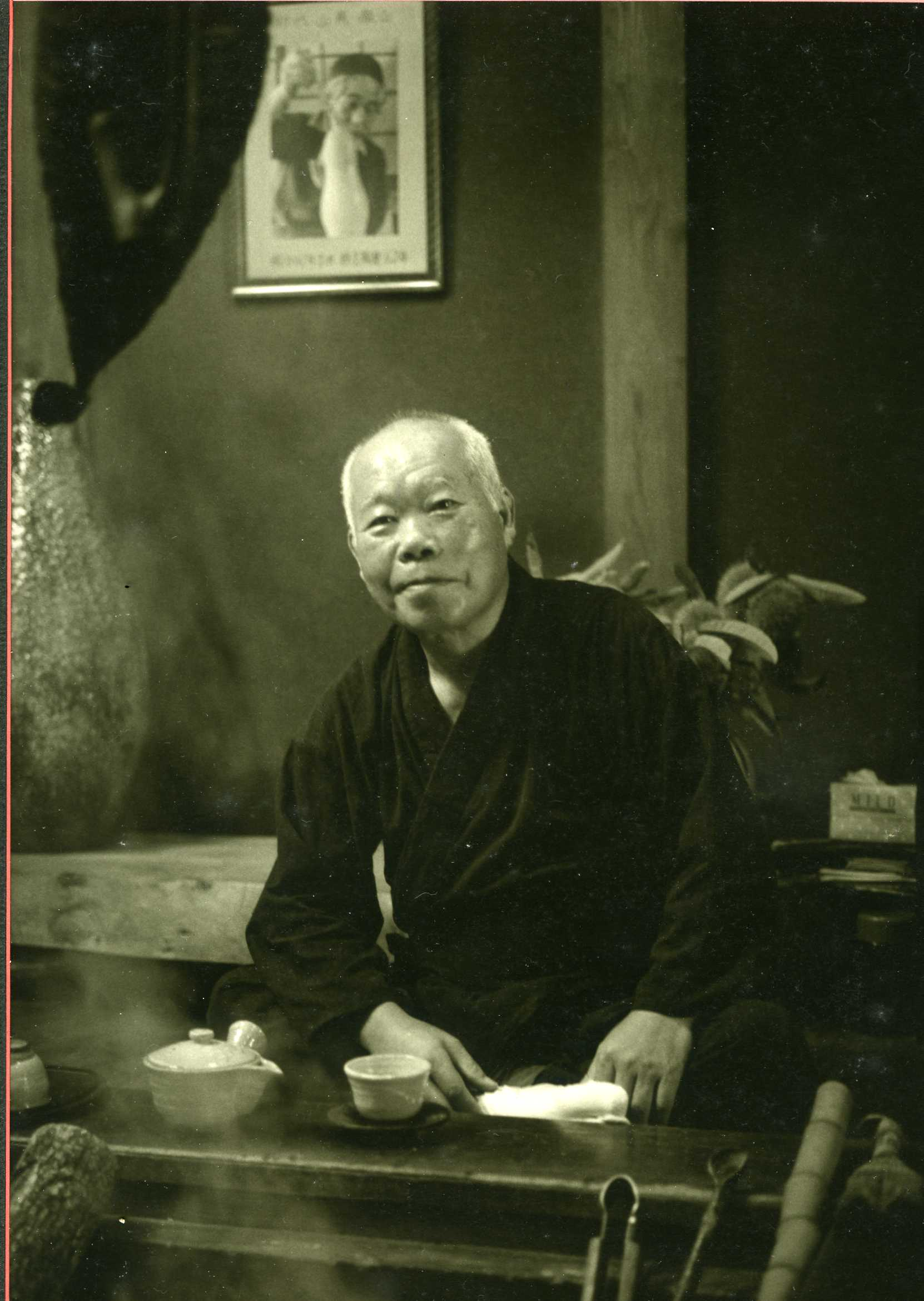 二代山岡徹山 山岡譲